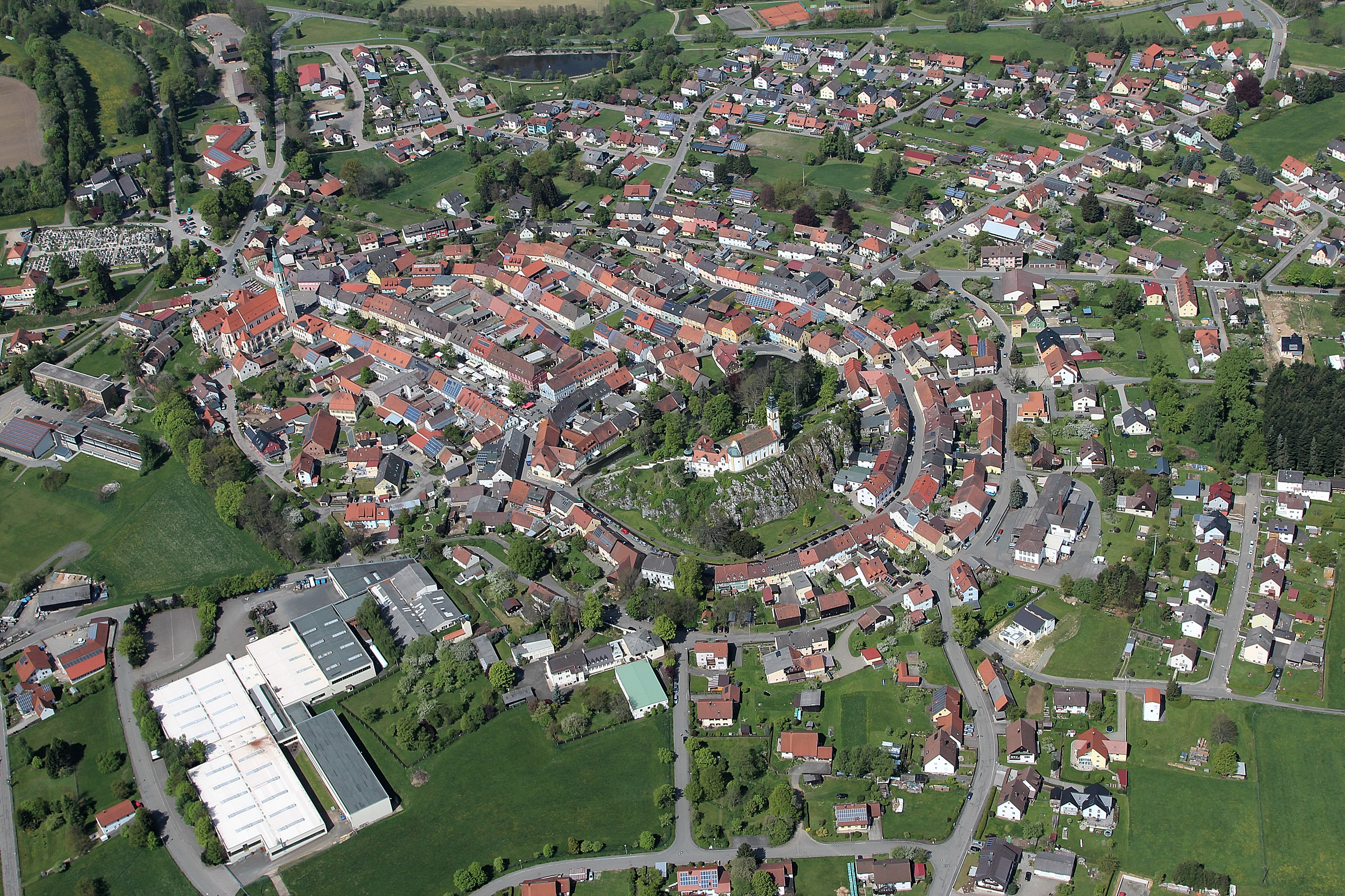 Pleystein, Landkreis Neustadt an der Waldnaab, Oberpfalz, Bayern